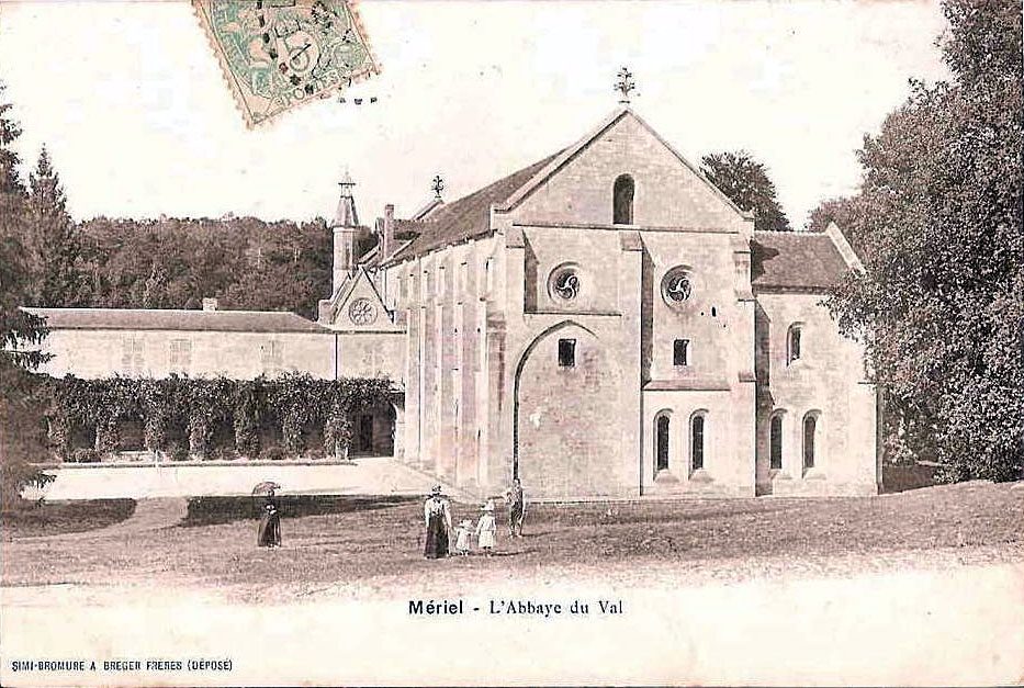 Abbaye Notre-Dame du Val, Mériel (Val-d'Oise), France.